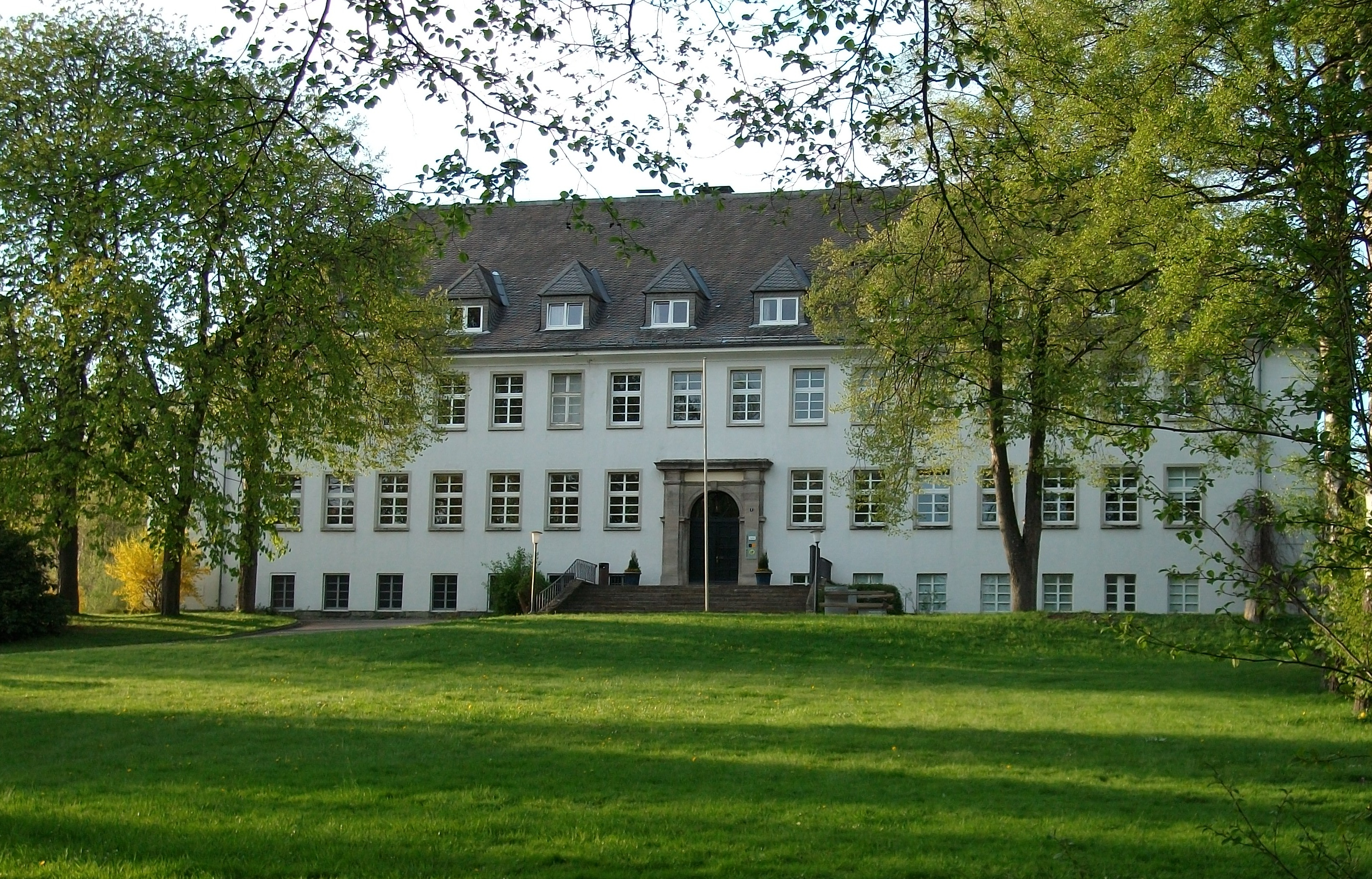 Akademie in Schmallenberg-Bad Fredeburg (Germany)